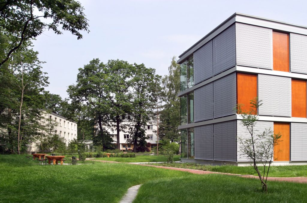 Berufsbildungswerk Sachsen, Wohnheim, Hellerhofstraße 21, 01129 Dresden, 2007